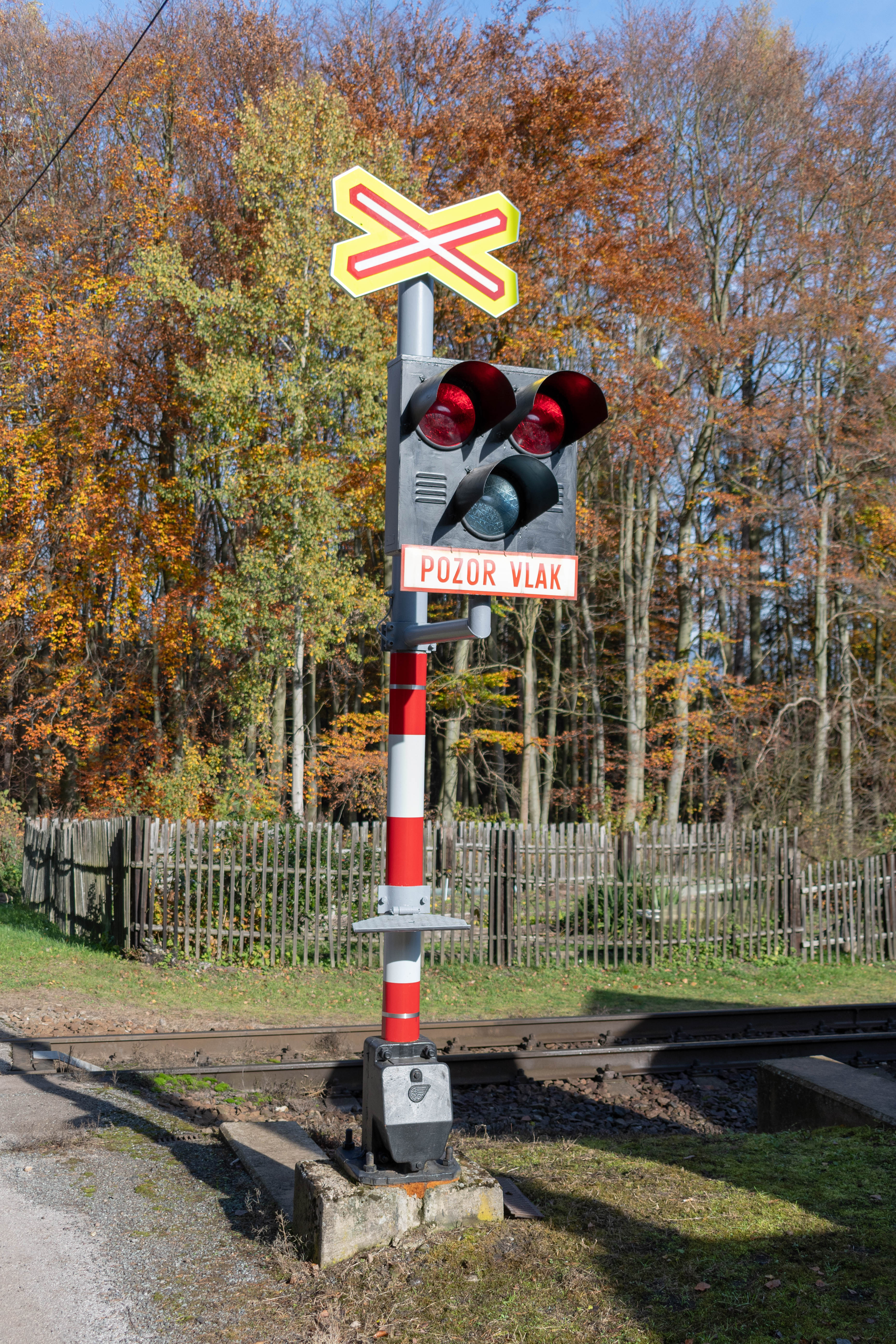 Železniční zastávka Březová u Broumova – přejezdové zabezpečovací zařízení